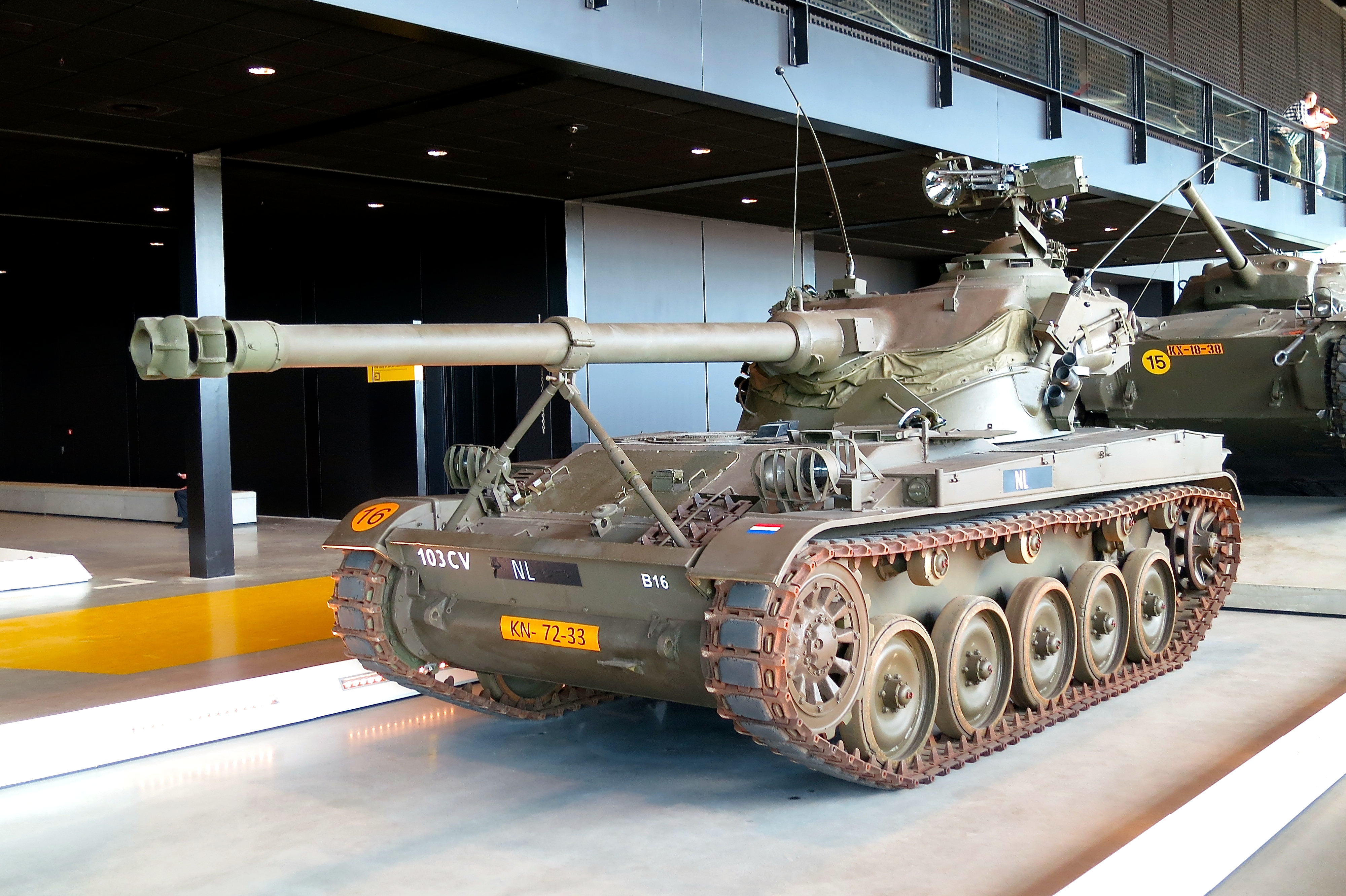 Van het Franse AMX pantservoertuig zijn door Nederland diverse uitvoeringen gebruikt. Deze lichte verkenningstank is voorzien van een 105mm kanon (standaard 75mm). Zie ook: The Netherlands imported several variants of the French AMX light tank. This one is fitted with a more powerfull 105mm gun instead of the standard 75mm version. Nationaal Militair Museum. The Dutch National Military Museum is situated on the former air base Soesterberg.